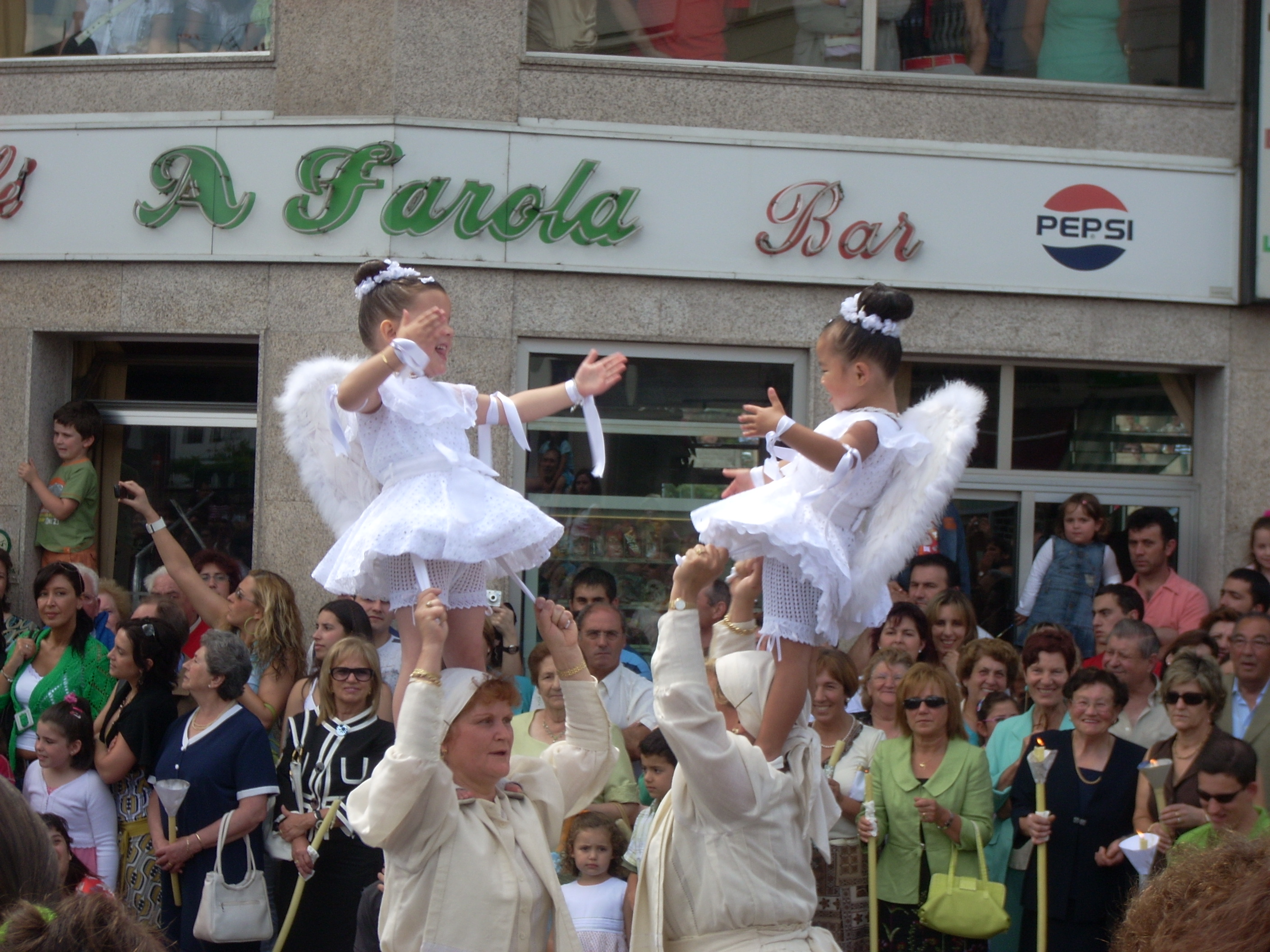 As penlas coas burras en Redondela